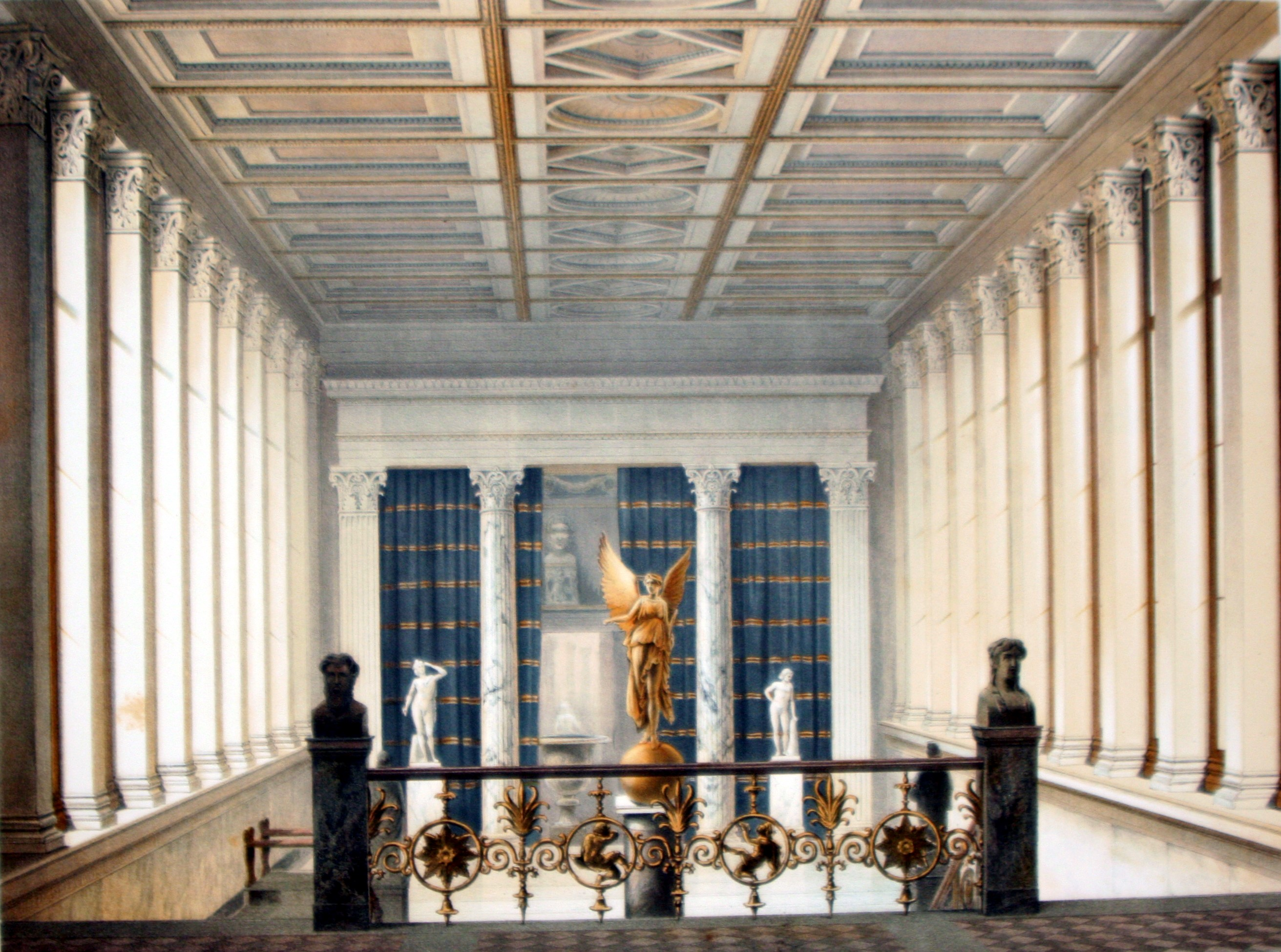 Berlin, Neues Museum: Verbindungsgang zum Alten Museum